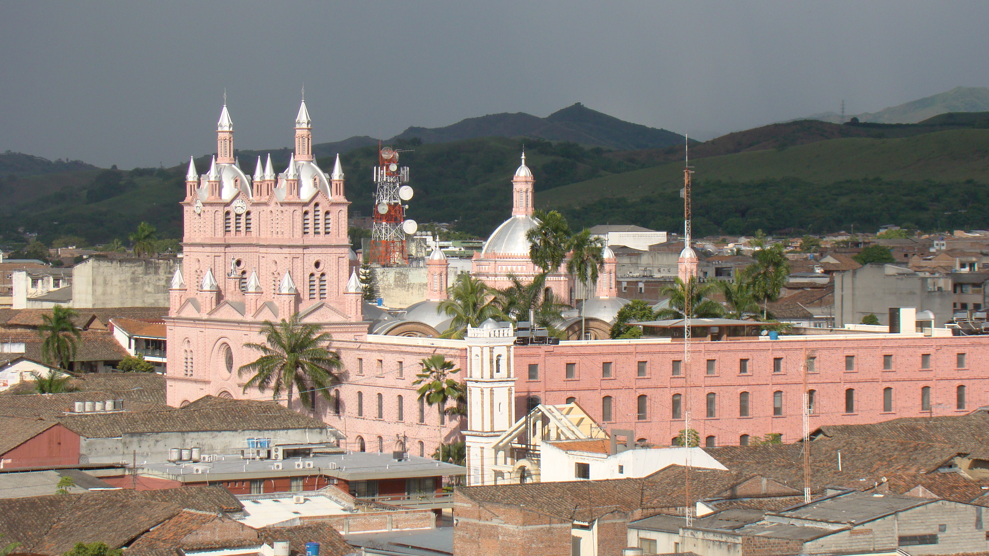 Sector Antiguo de la ciudad de Buga